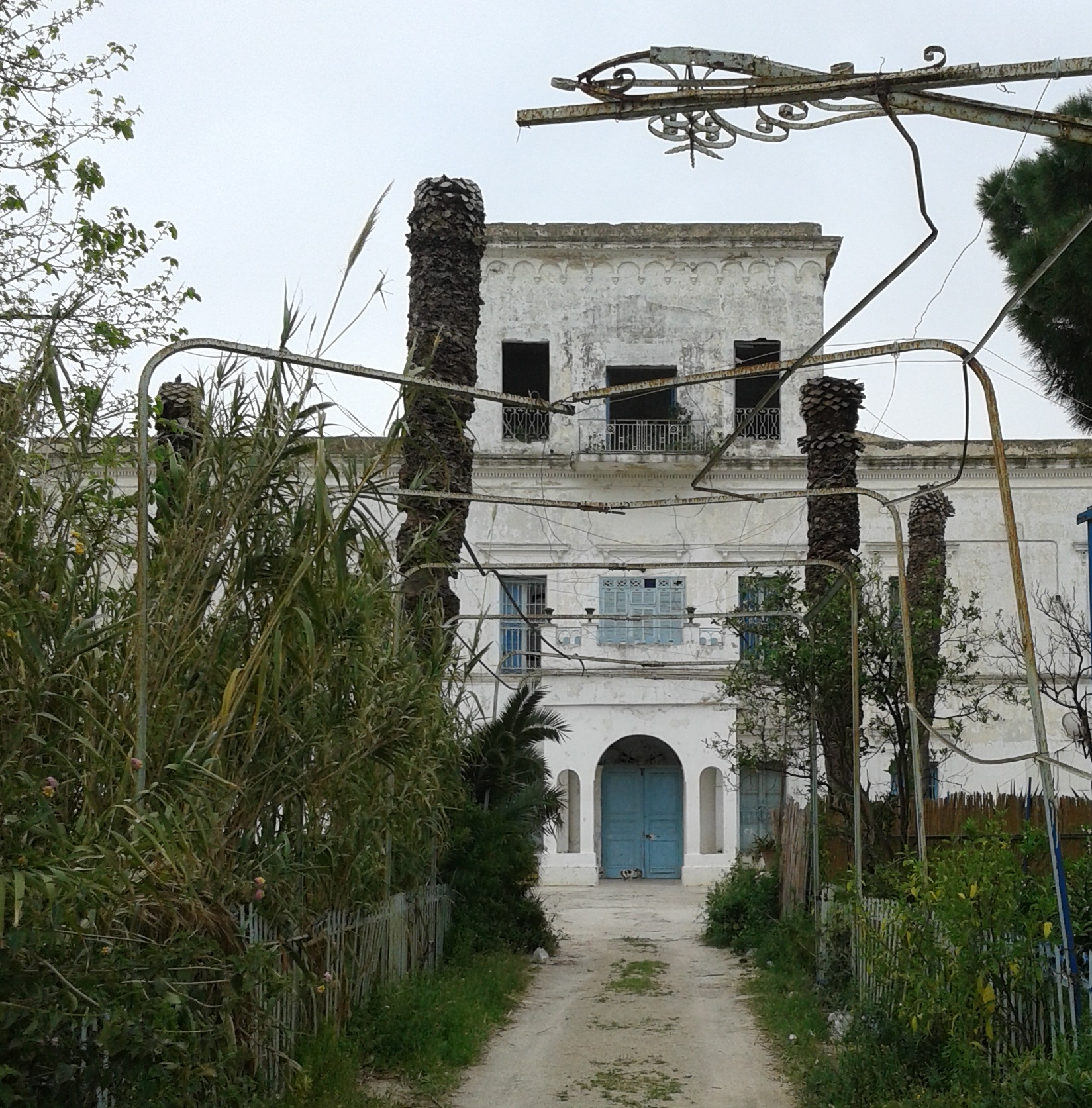 Palais du général Kheireddine à Kheireddine